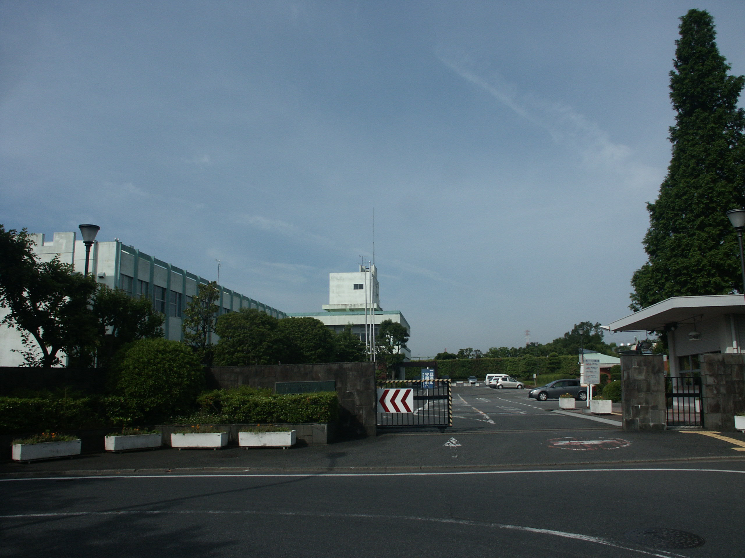 埼玉県戸田市に所在する埼玉県荒川水循環センター